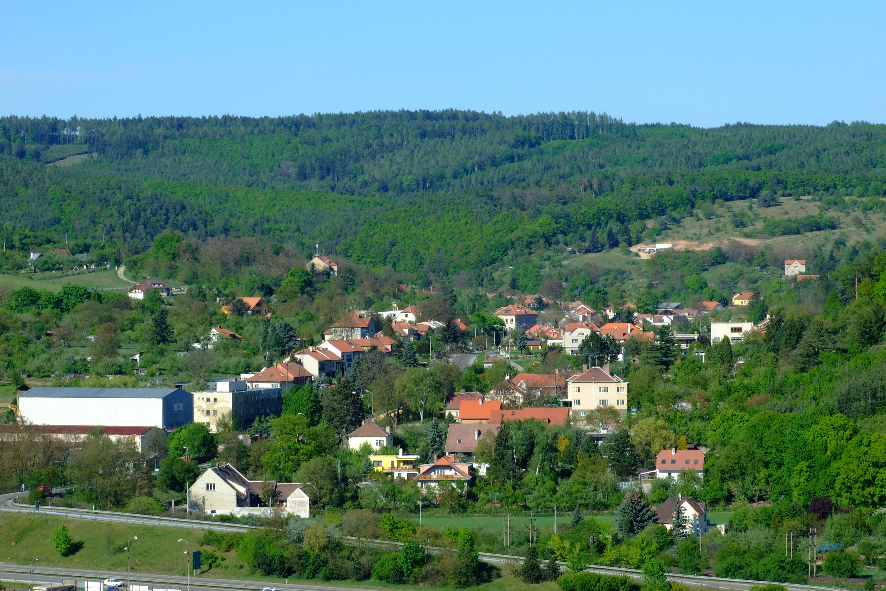 Global view on village of Lelekovice Celkový pohled na obec Lelekovice